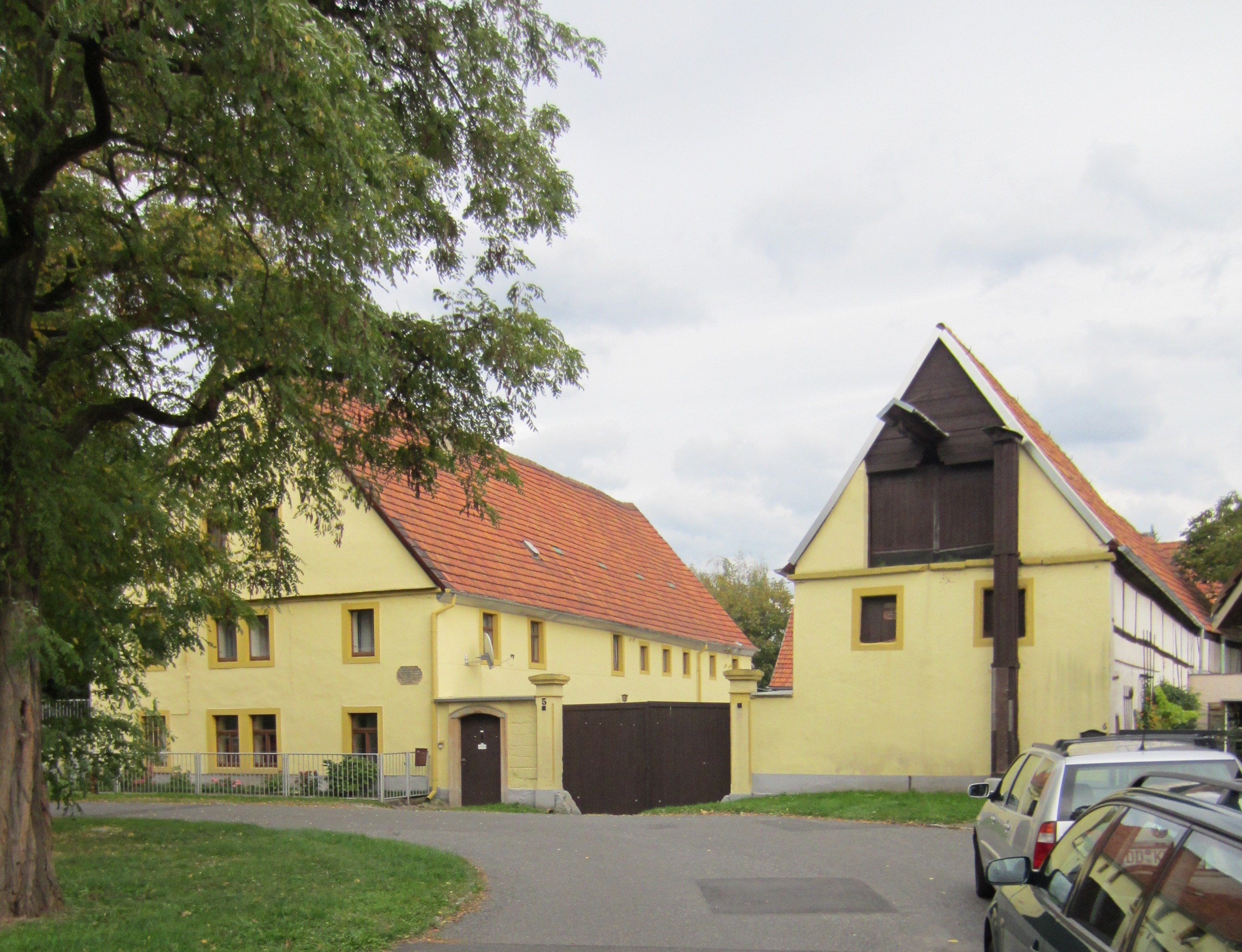 Denkmalgeschützter Bauernhof in Sporbitz (Dresden), Altsporbitz 5